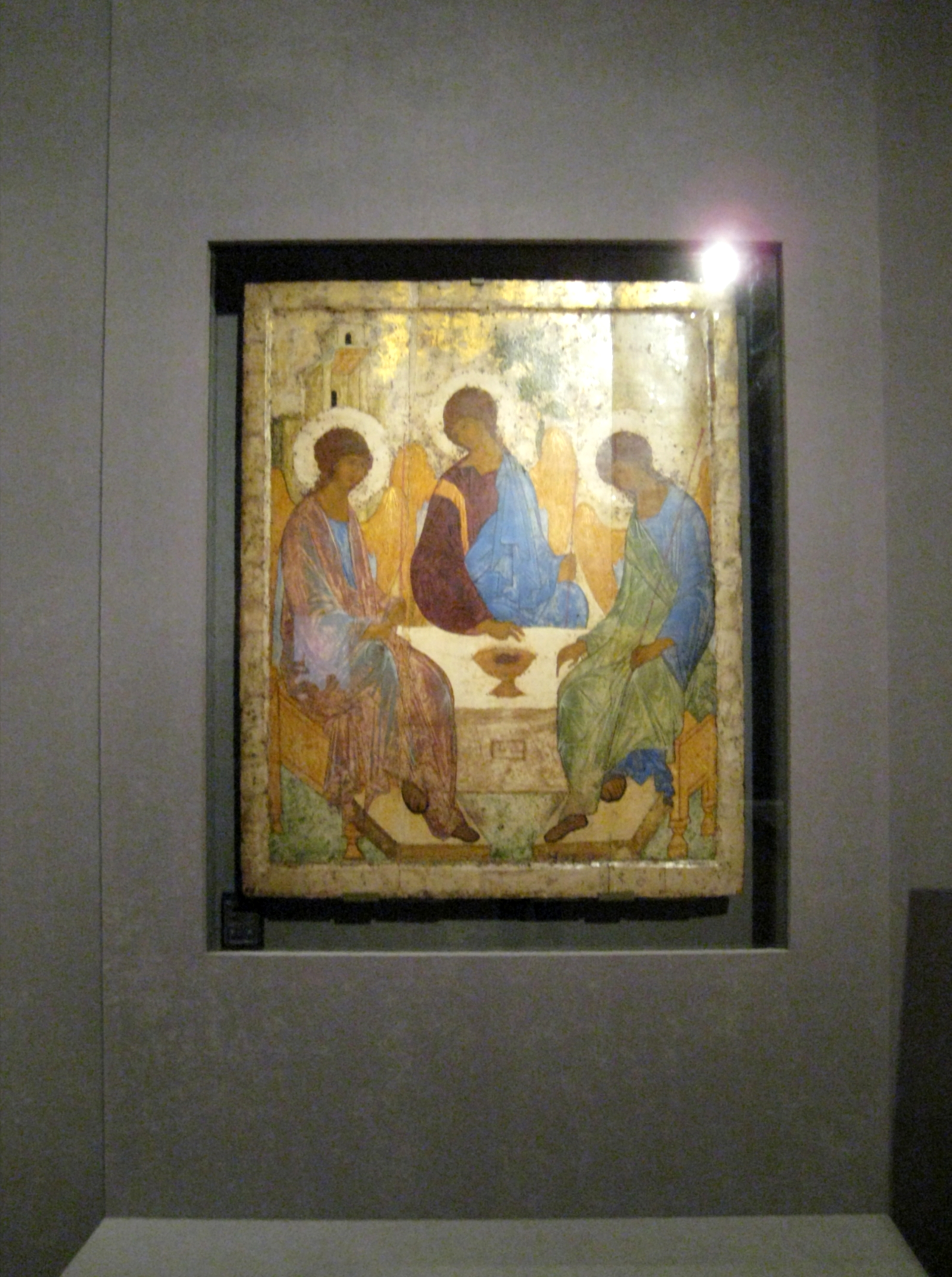 Троица